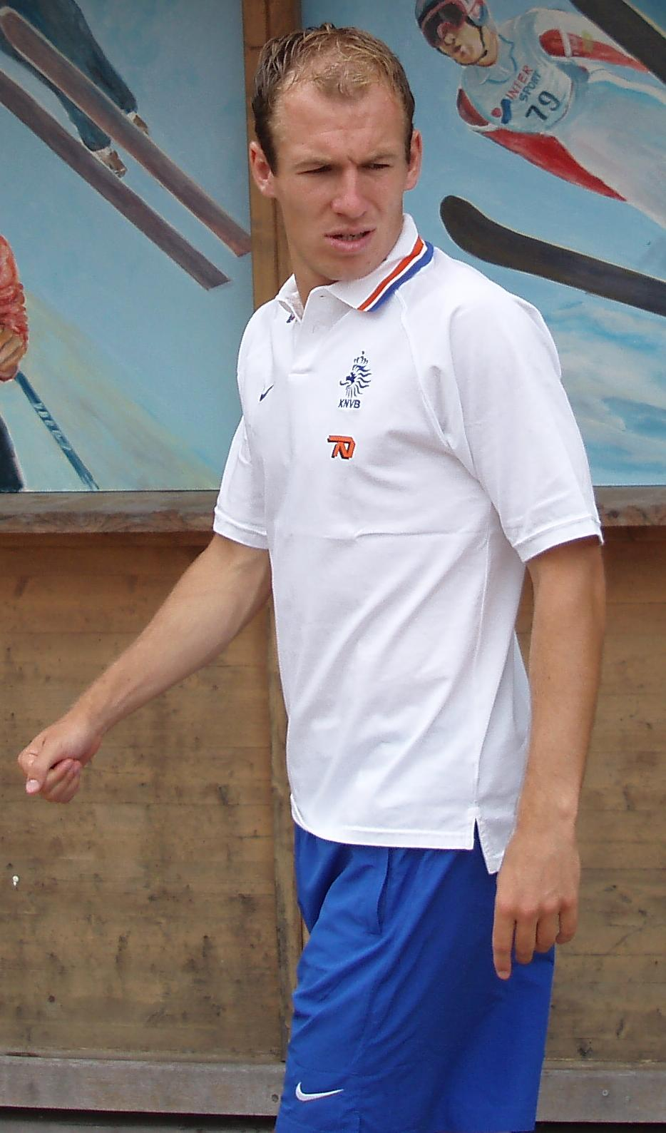 Arjen Robben, Spieler der niederländischen Fußballnationalmannschaft